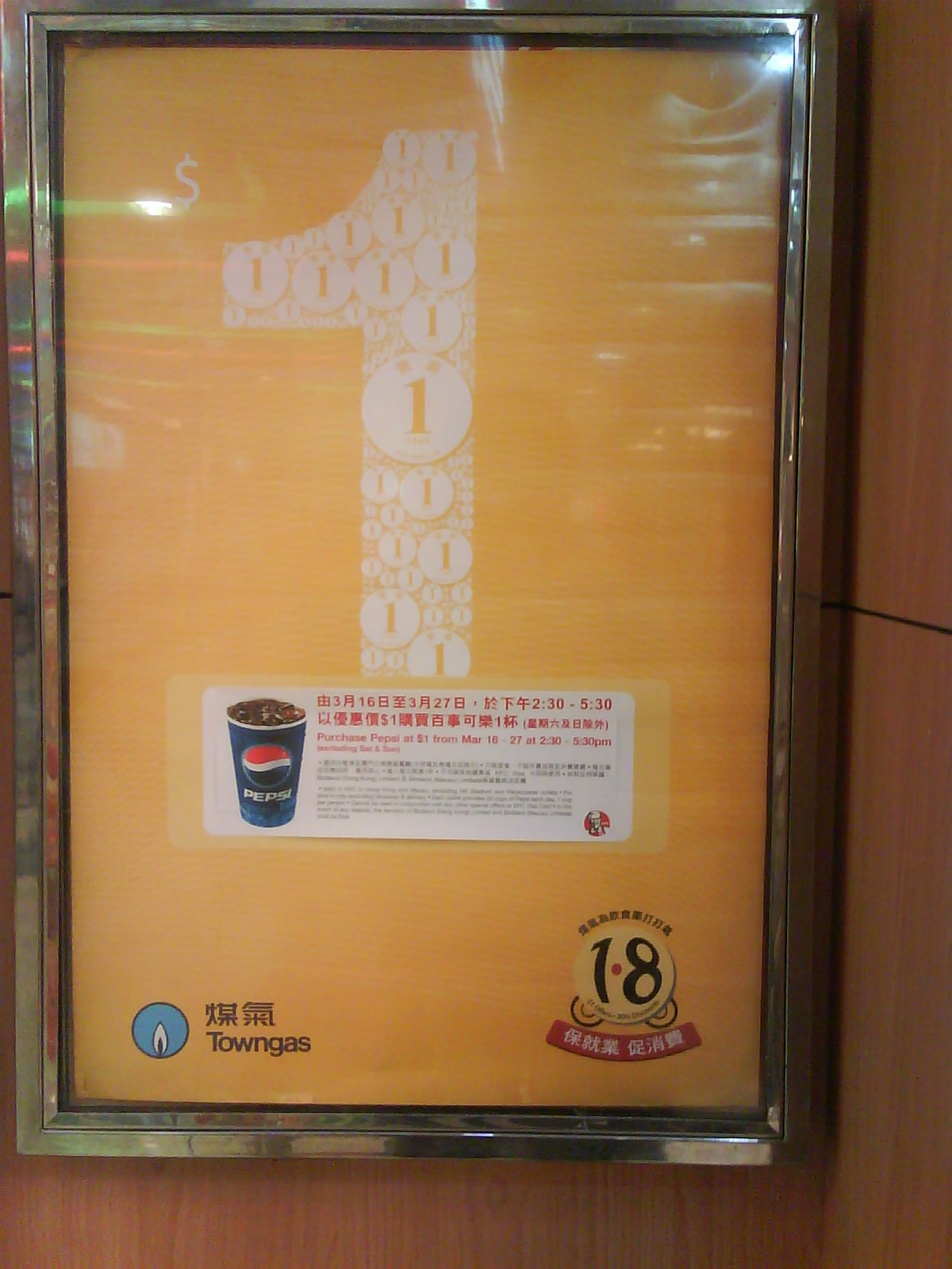 齊抗金融海嘯大聯盟的宣傳海報